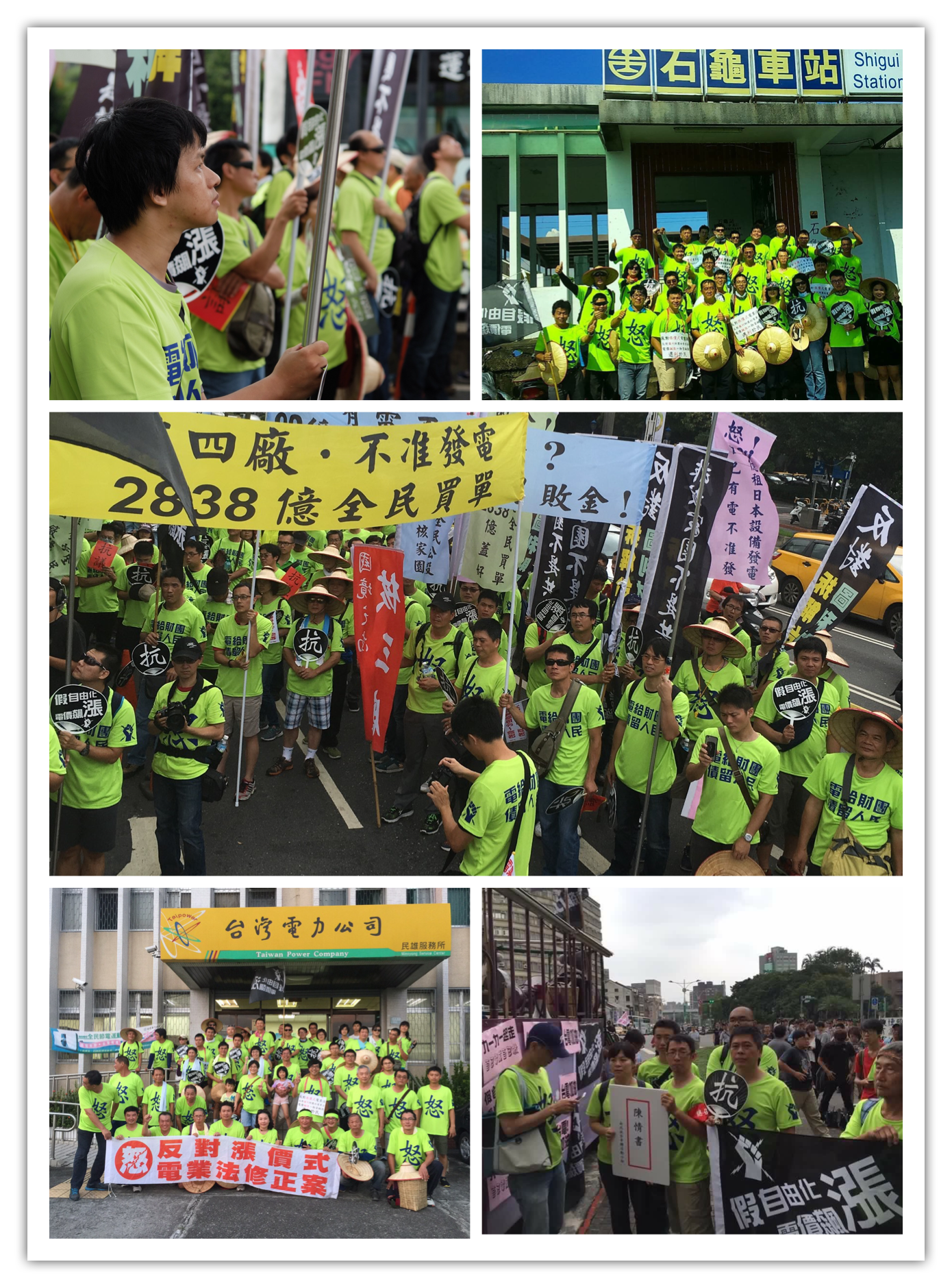 南北徒步串聯活動照片